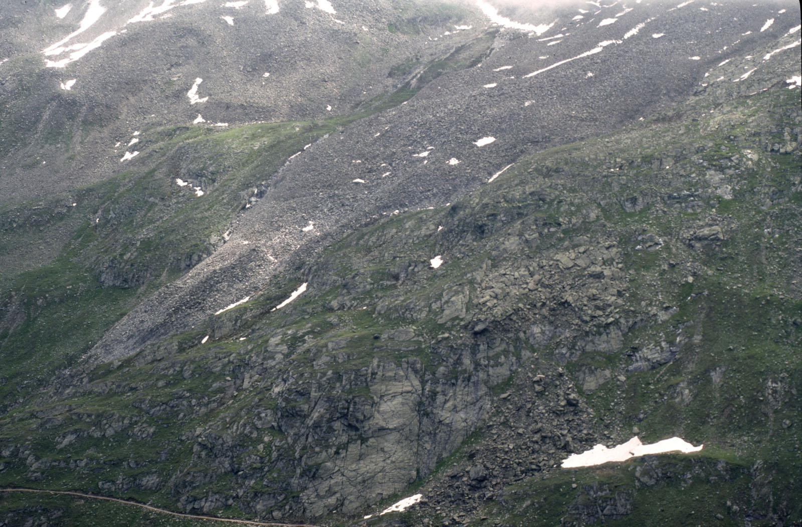 Rock glacier (Äußeres Hochebenkar) near Obergurgl, Austria